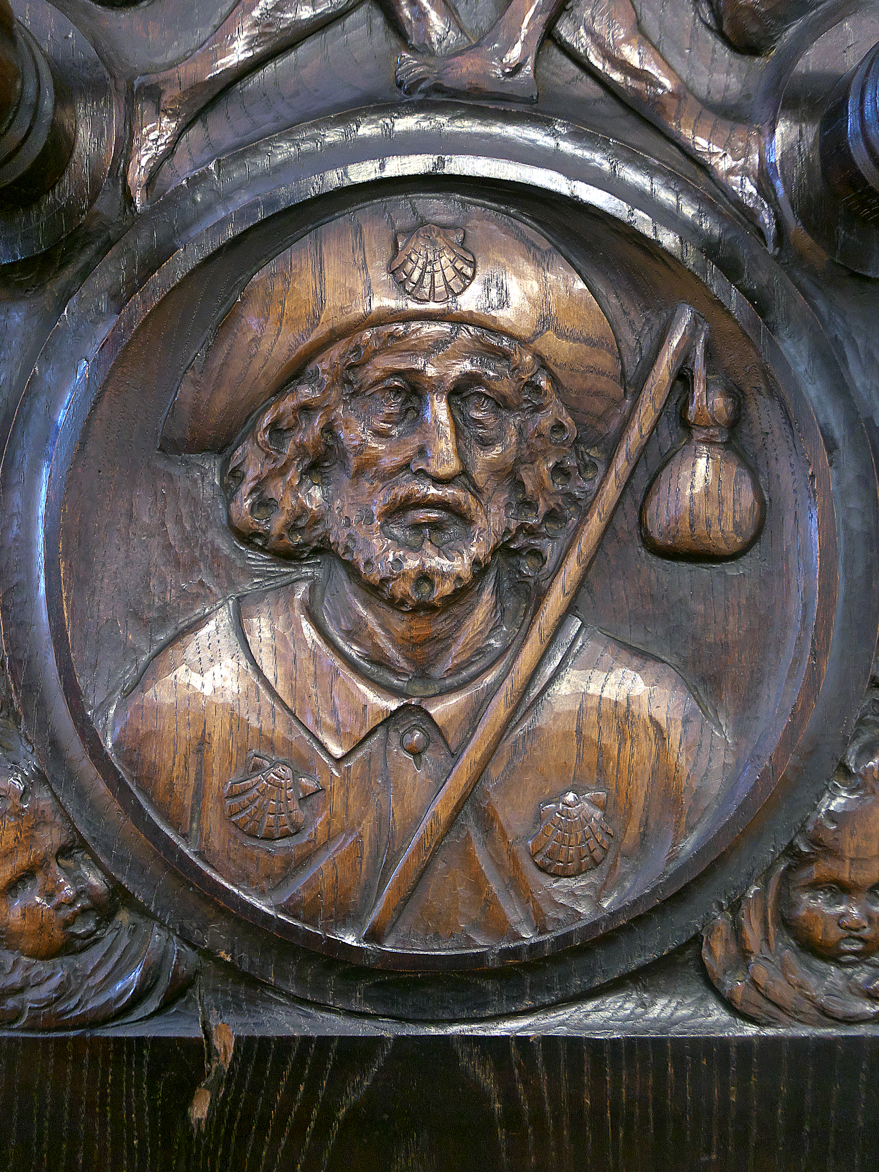 Talla en madera de Maximino Magariños Rodríguez en el Museo de Vigo.